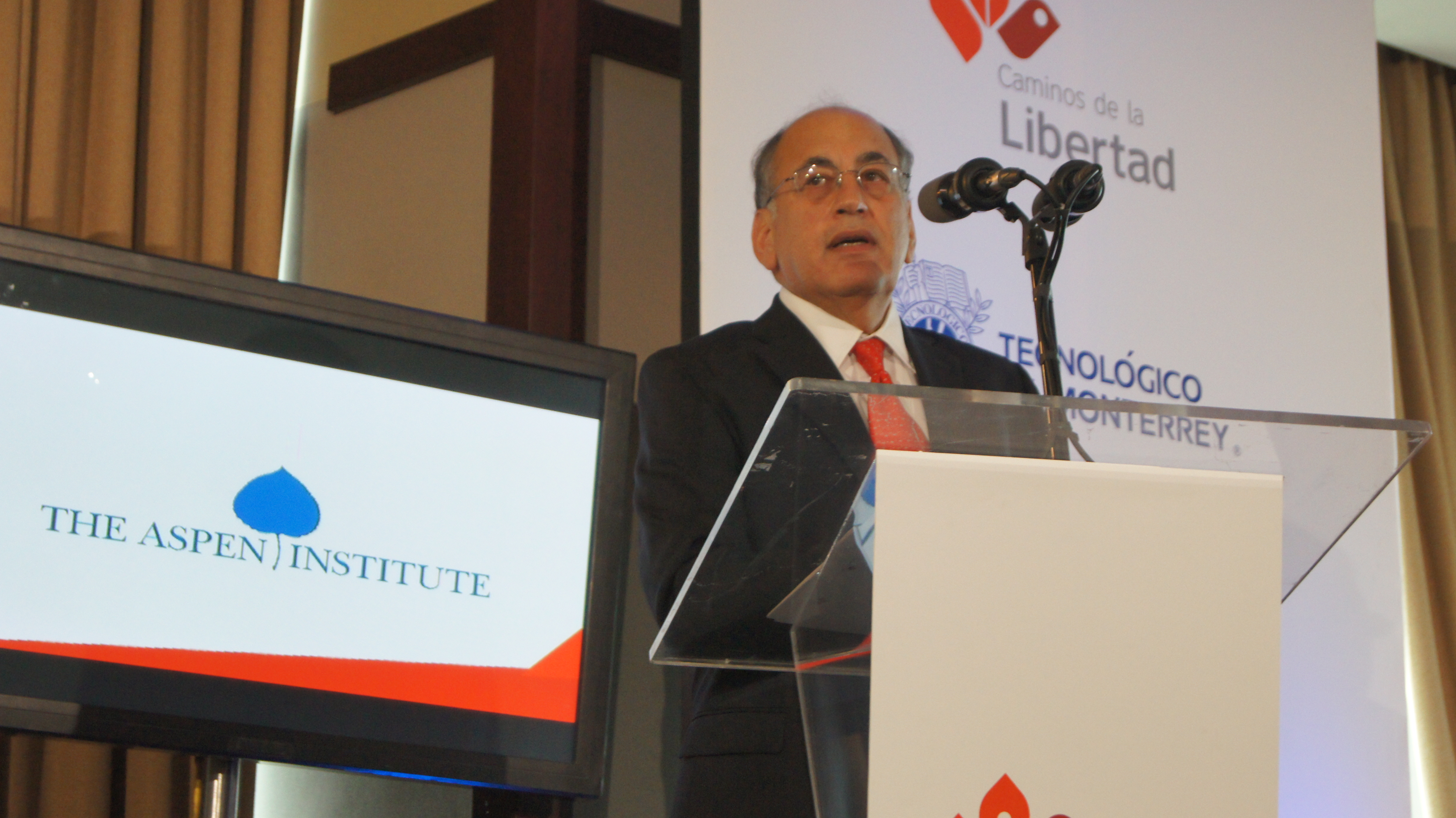 Charlie Firestone del Instituto Aspen en la presentación del informe Libertad y Conectividad: Fomento a la libertad para comunicar en las Américas para el nuevo gobierno federal en el Piso 51 del Torre Mayor